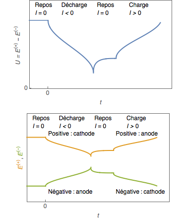 Définitions de positive, négative d'accumulateur et de leur fonctionnement en cours de décharge